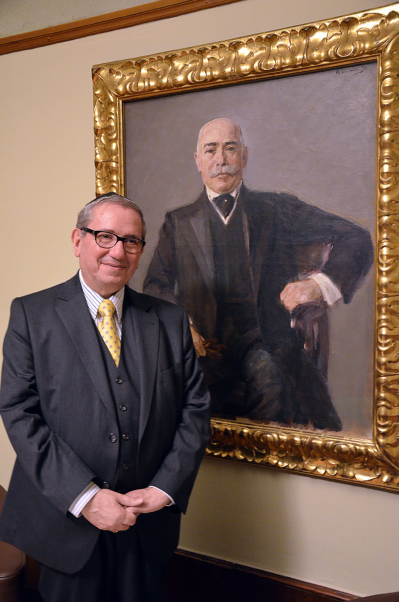 1910 malte der Künstler Max Liebermann den Direktor der (heutigen) Continental AG, Siegmund Seligmann. Das Gemälde war lange Zeit im Besitz des Niedersächsischen Landesmuseums in Hannover. Professor Andor Izsák vom Europäischen Zentrum für jüdische Musik präsentiert hier in der Villa Seligmann (Hohenzollernstraße 39 an der Eilenriede) das originale Werk als Dauerleihgabe der Nachkommen Seligmanns um die Familie des Stifters Esteban Seleguan ...